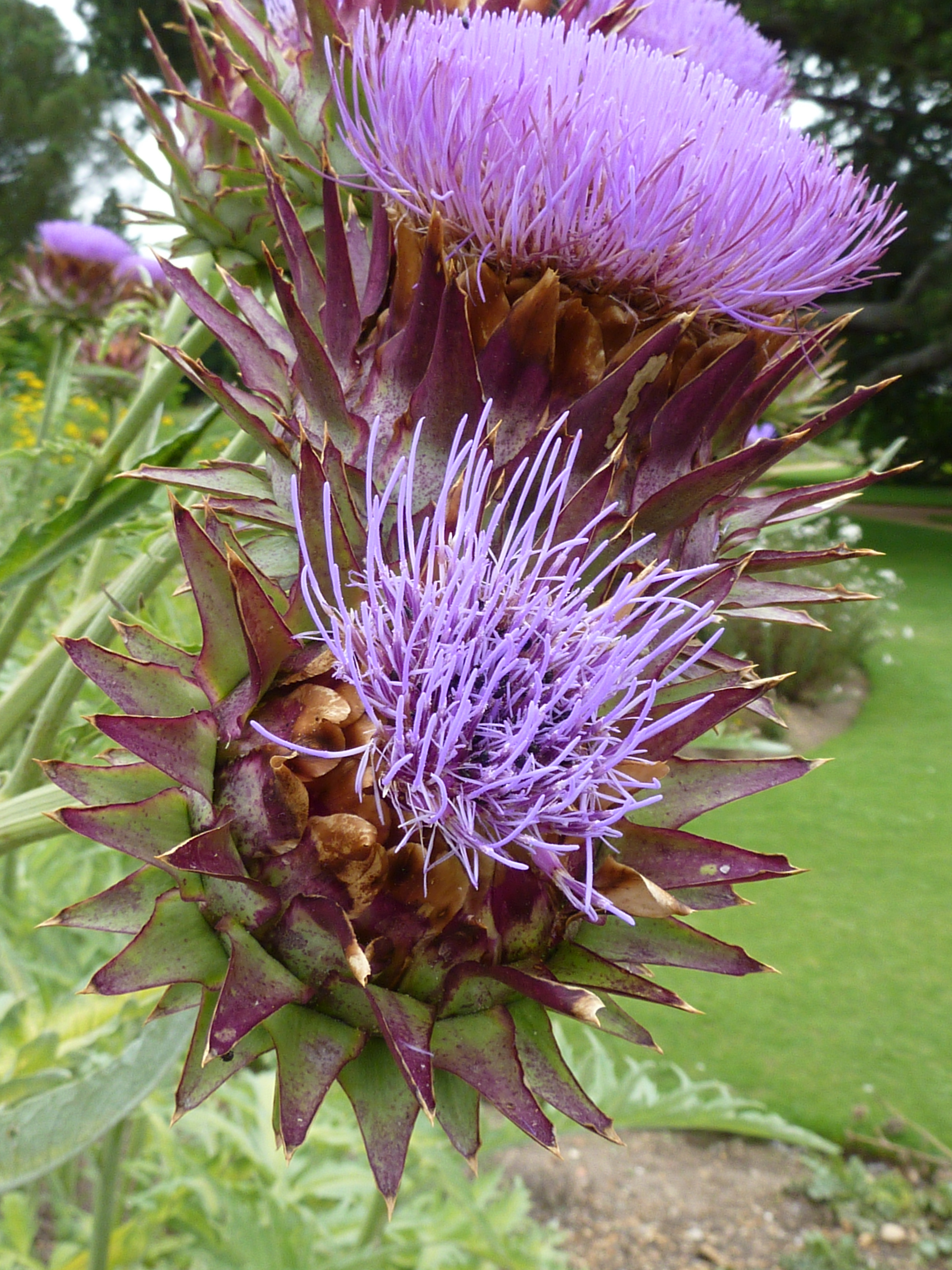 Cynara cardunculus, Cambridge University Botanic Garden